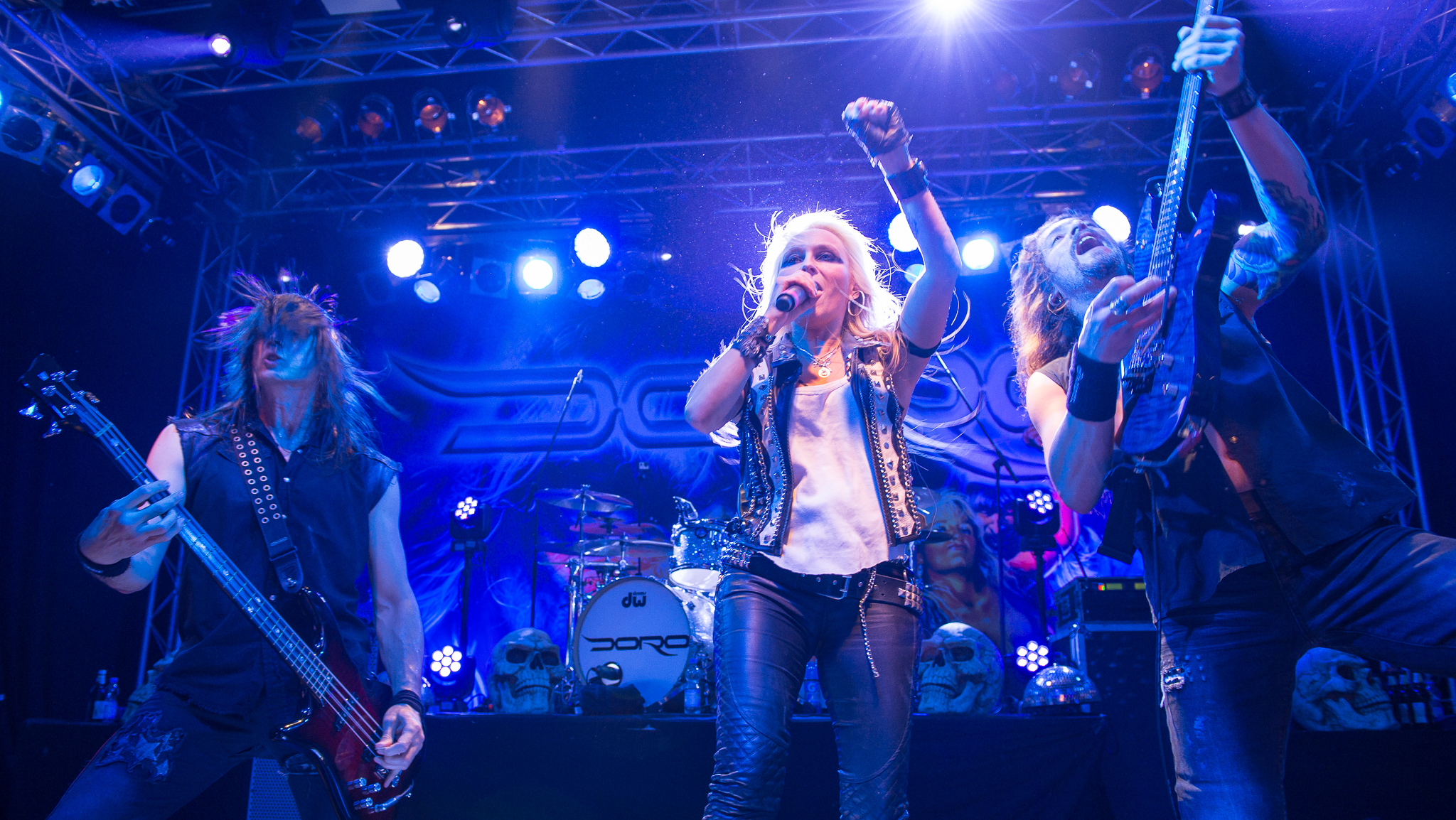 Concertbüro Franken,Doro,Doro Pesch,Konzert,Livekonzert,Livemusik,Löwensaal,Musik